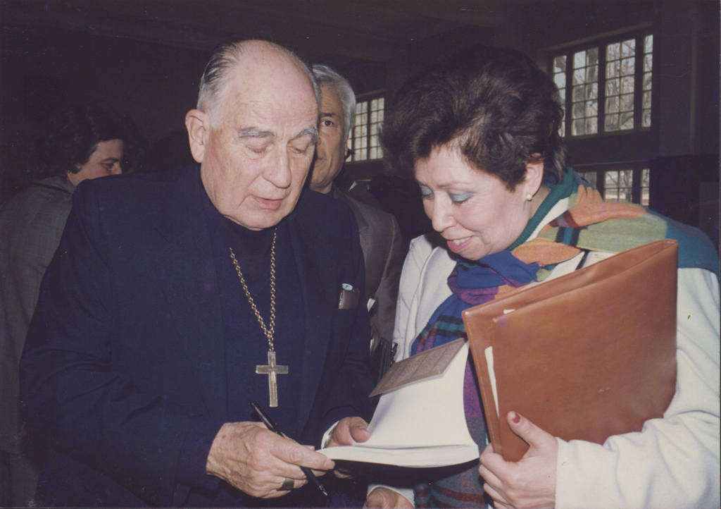 Wilna Saavedra, junto al cardenal Raúl Silva Henríquez.